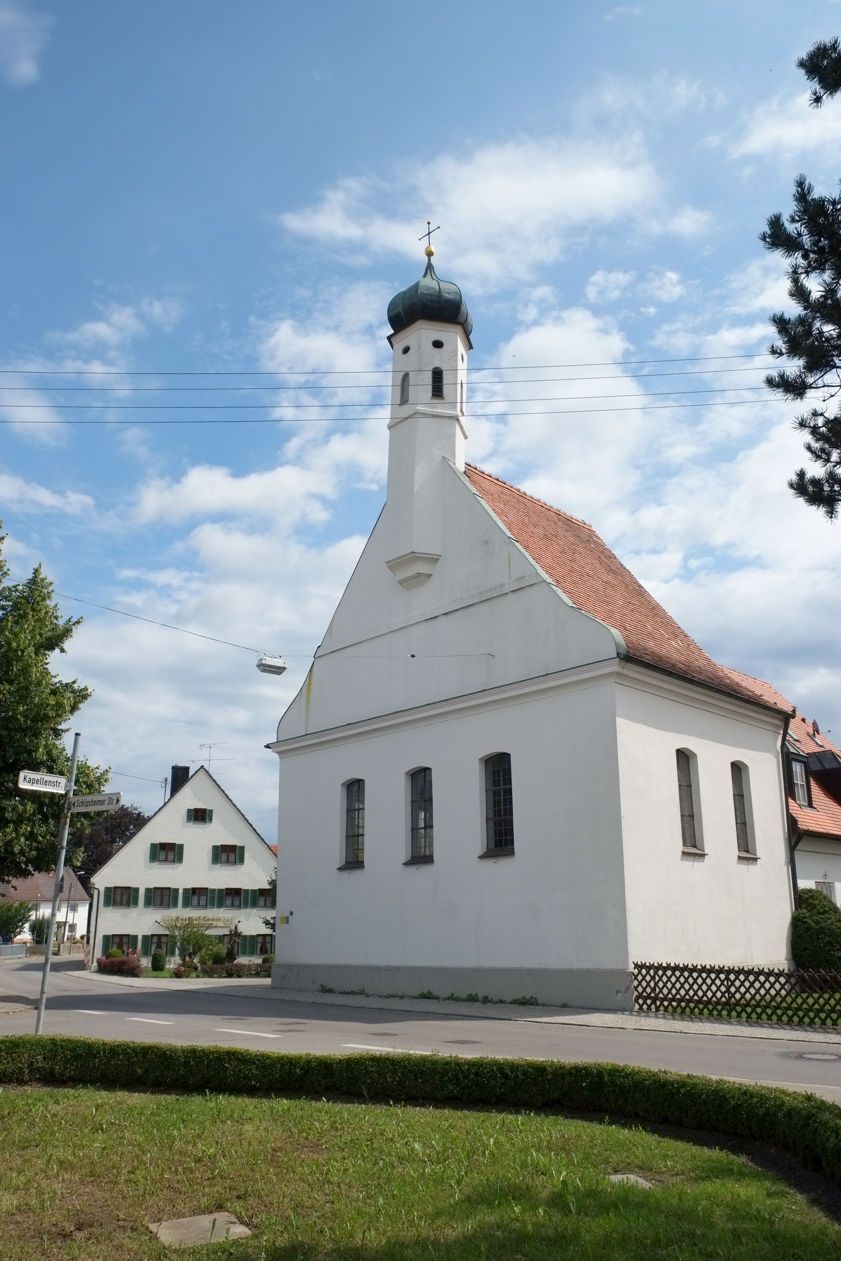 Kapelle St. Nikolaus von Tolentino in Schlipsheim, einem Ortsteil von Neusäß im Landkreis Augsburg (Bayern, Deutschland)